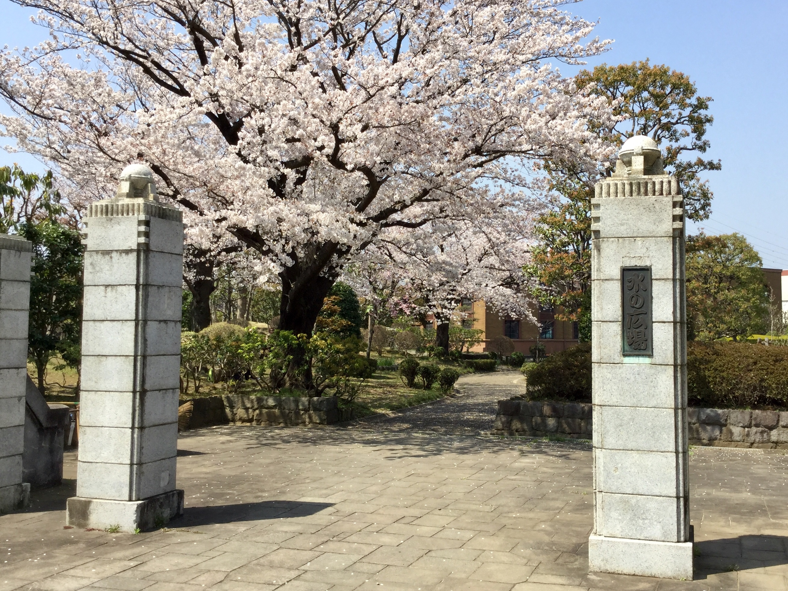 神奈川県水道記念館の旧正門